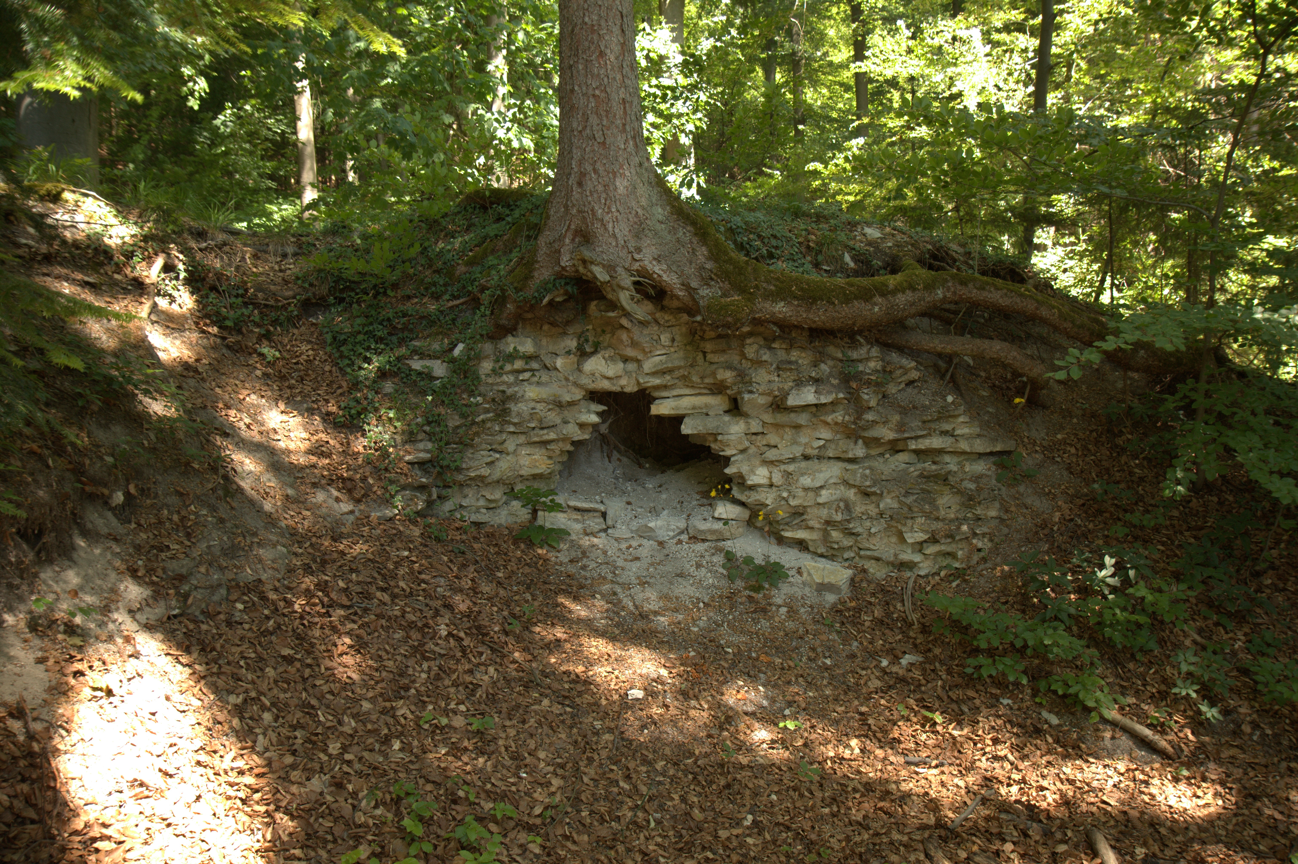 Burgstall Hohenbrunnen - Letztes sichtbares Mauerwerk